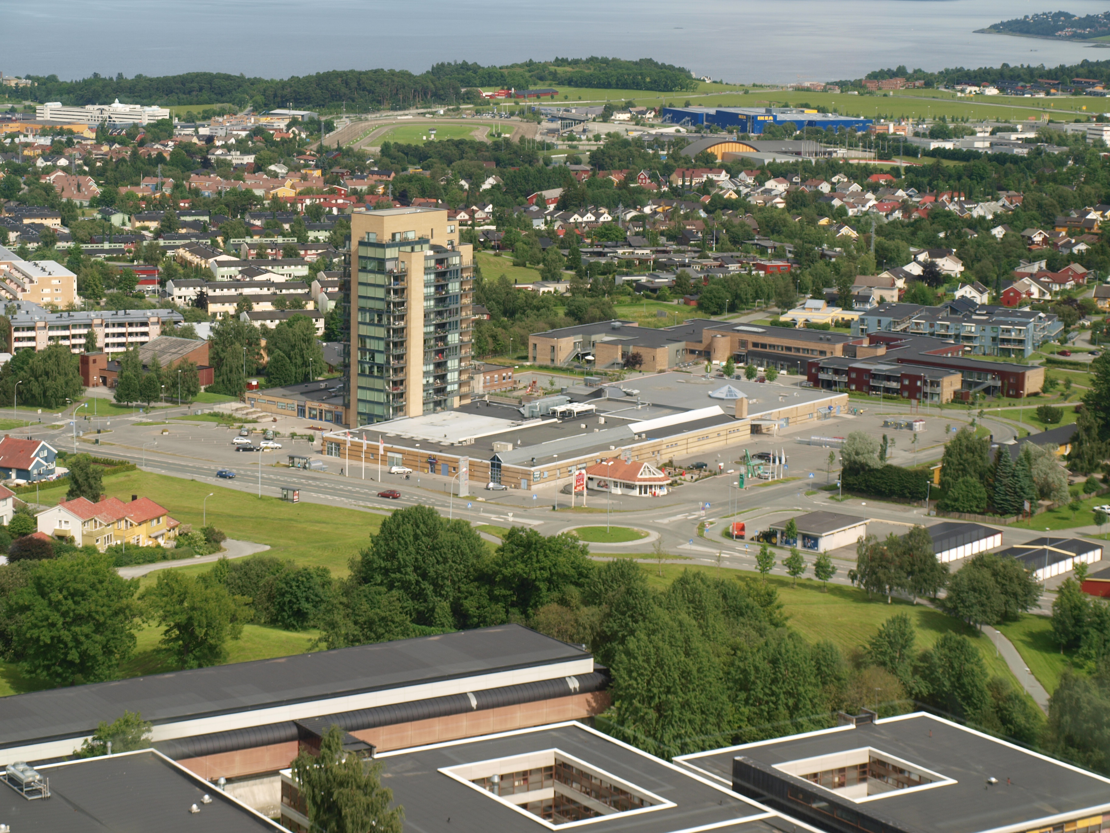 Valentinlystsentereret på Valentinlyst i Trondheim. Bildet er tatt fra Tyholttårnet.